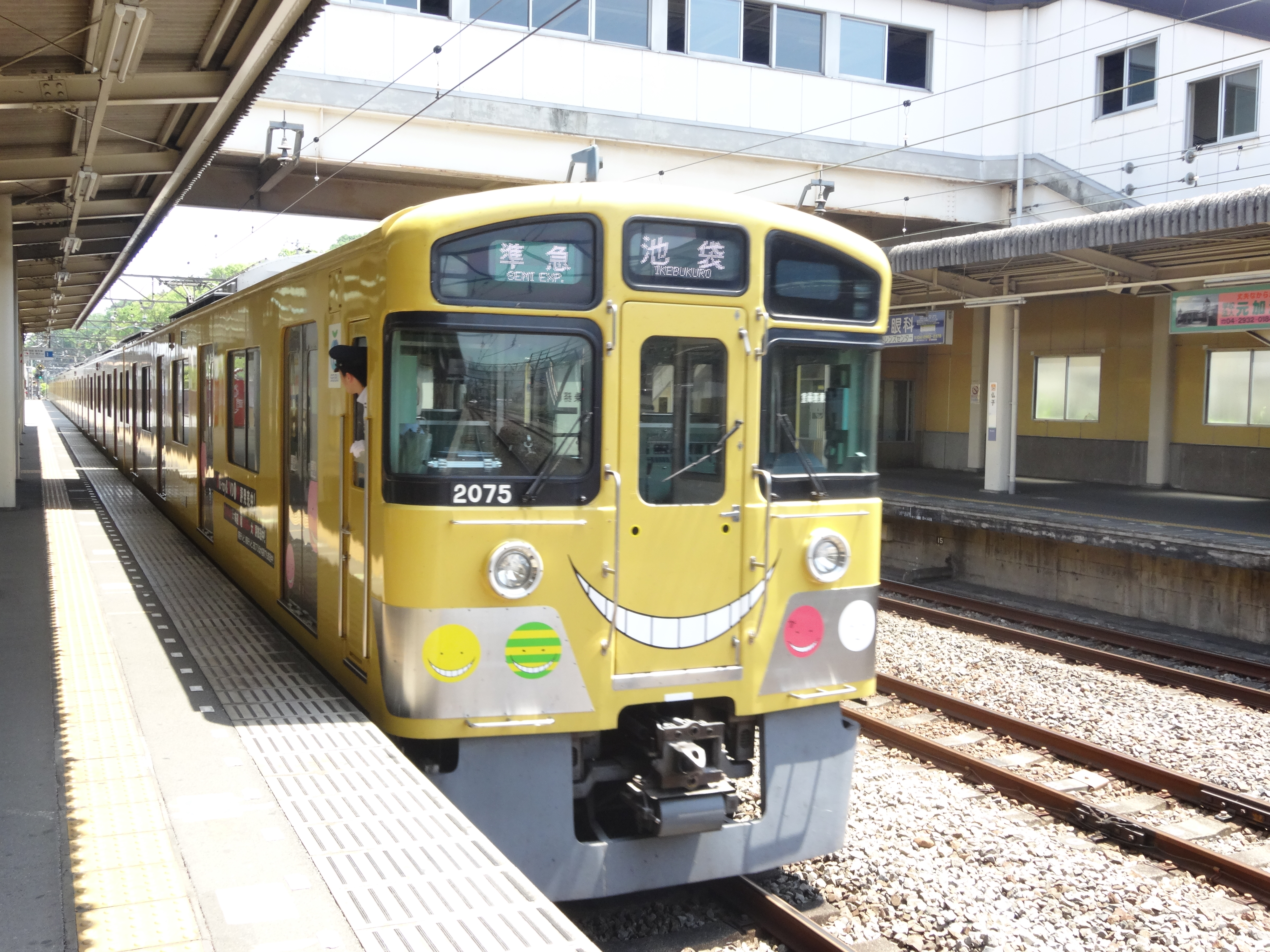 西武鉄道 新2000系2075編成(8両編成)。『暗殺教室』殺せんせーのラッピングが施されている。仏子駅にて撮影。